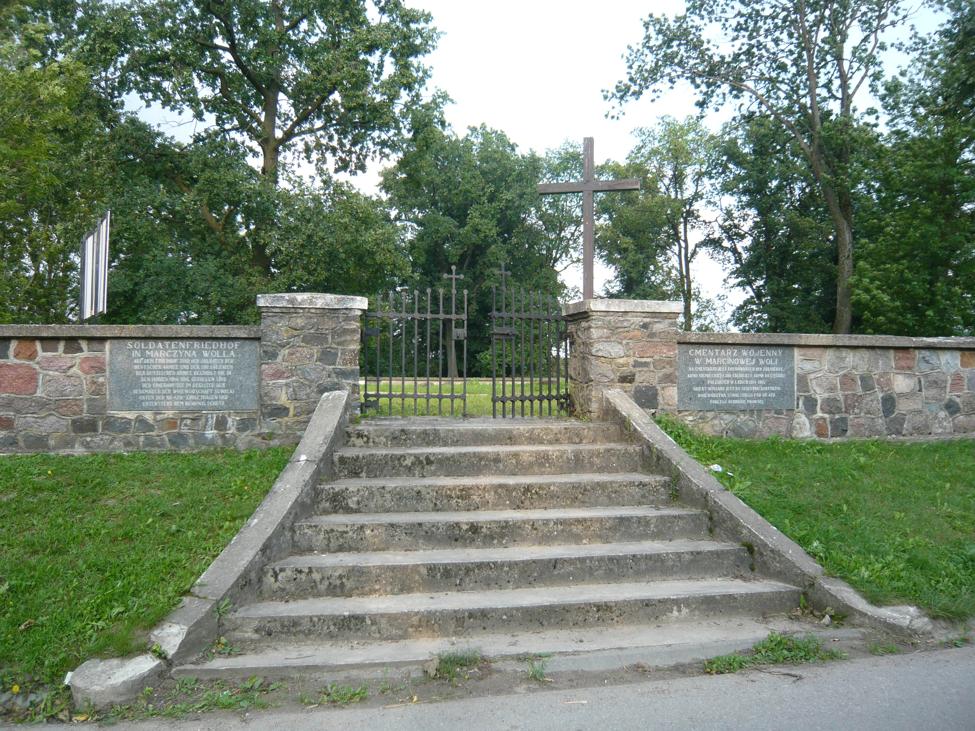 Cmentarz wojenny w Marcinowej Woli